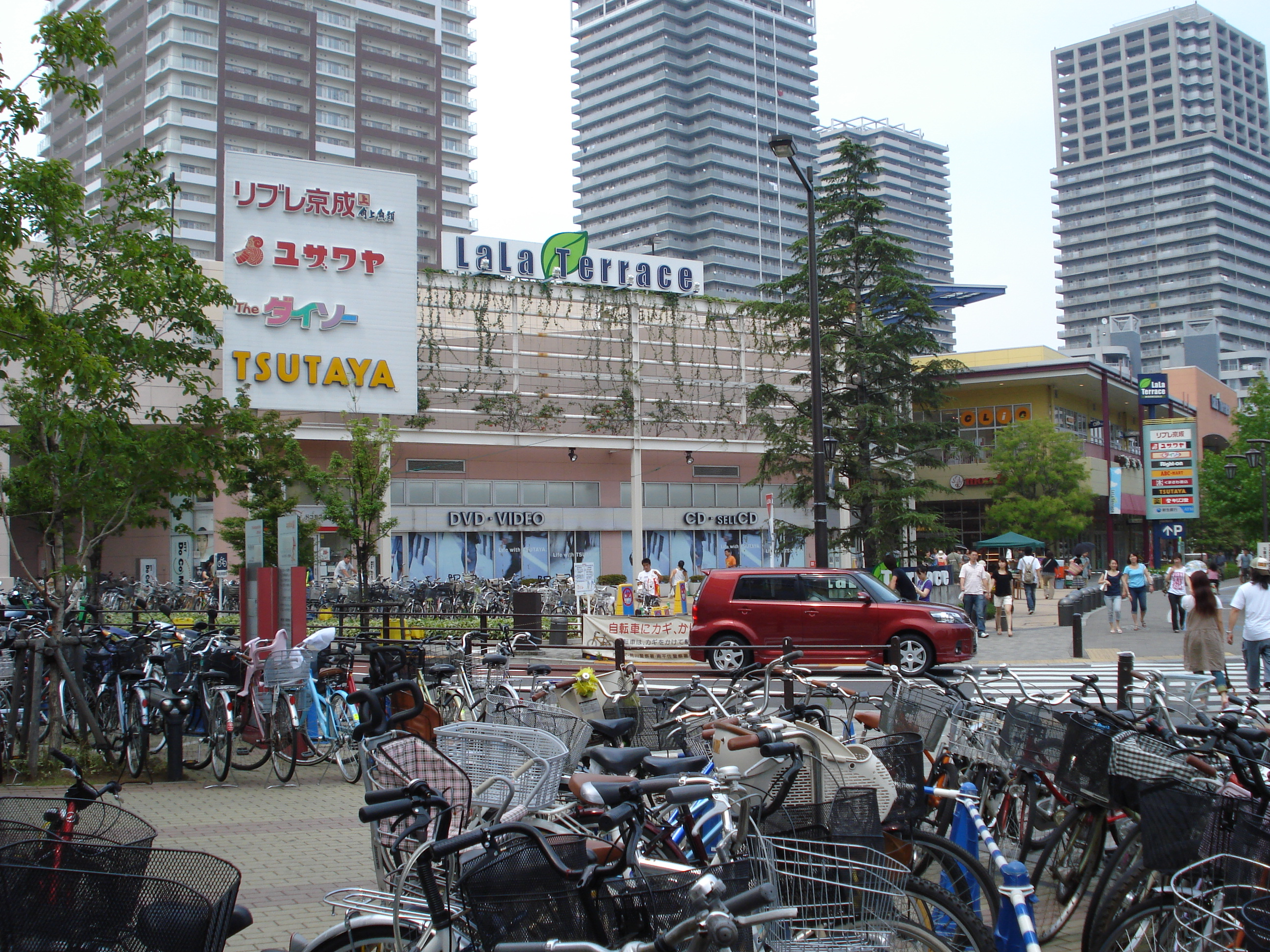 lala terrace